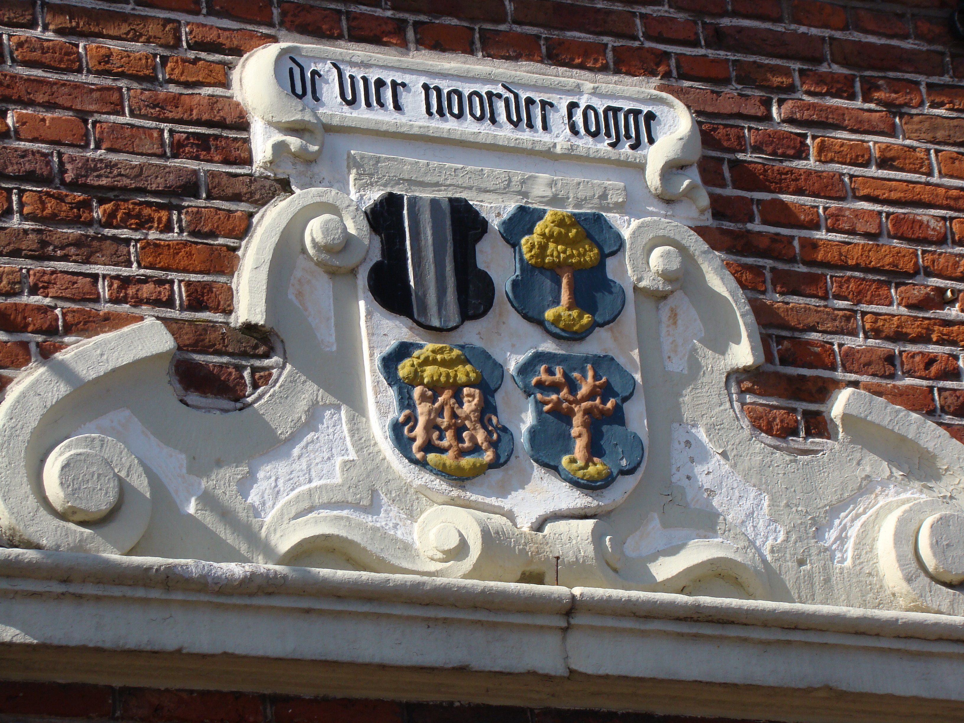 Impressions of Medemblik